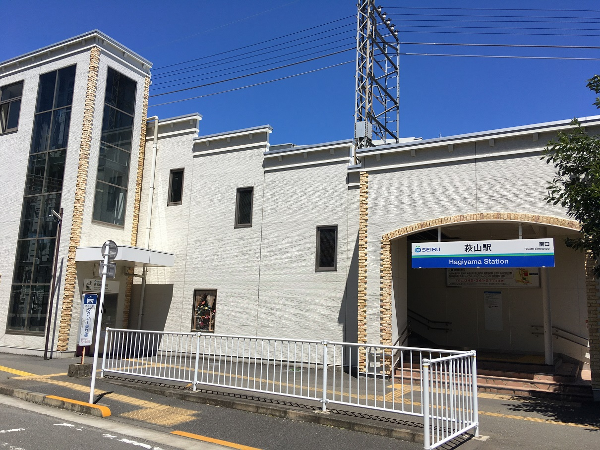 萩山駅南口